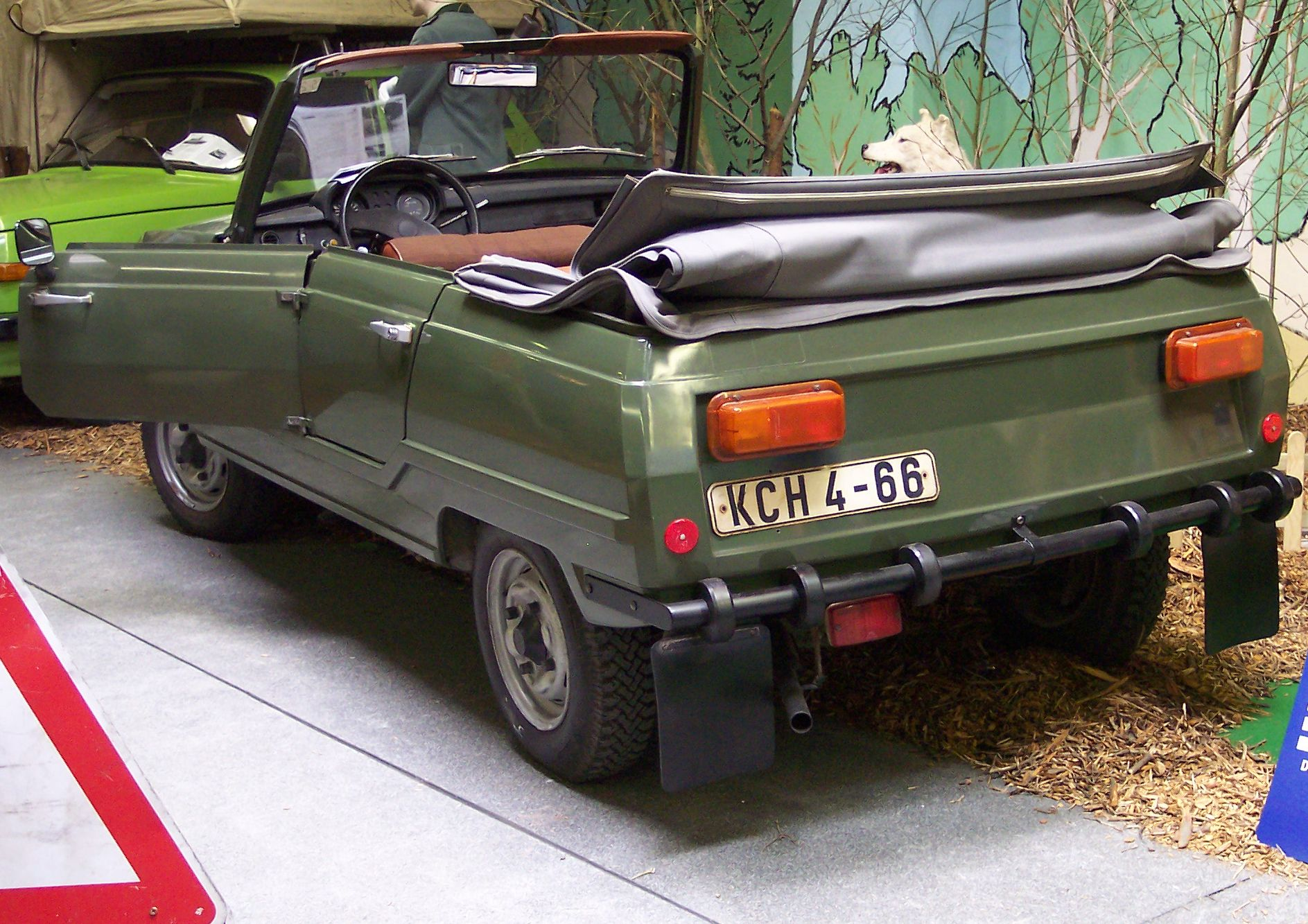 Wartburg 353-400